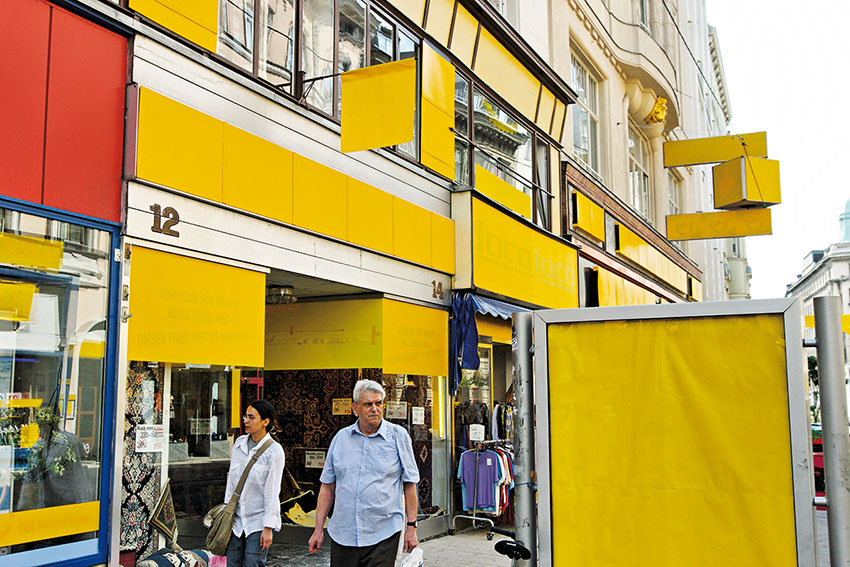 Delete! fand 2005 in der Wiener Neubaugasse statt.